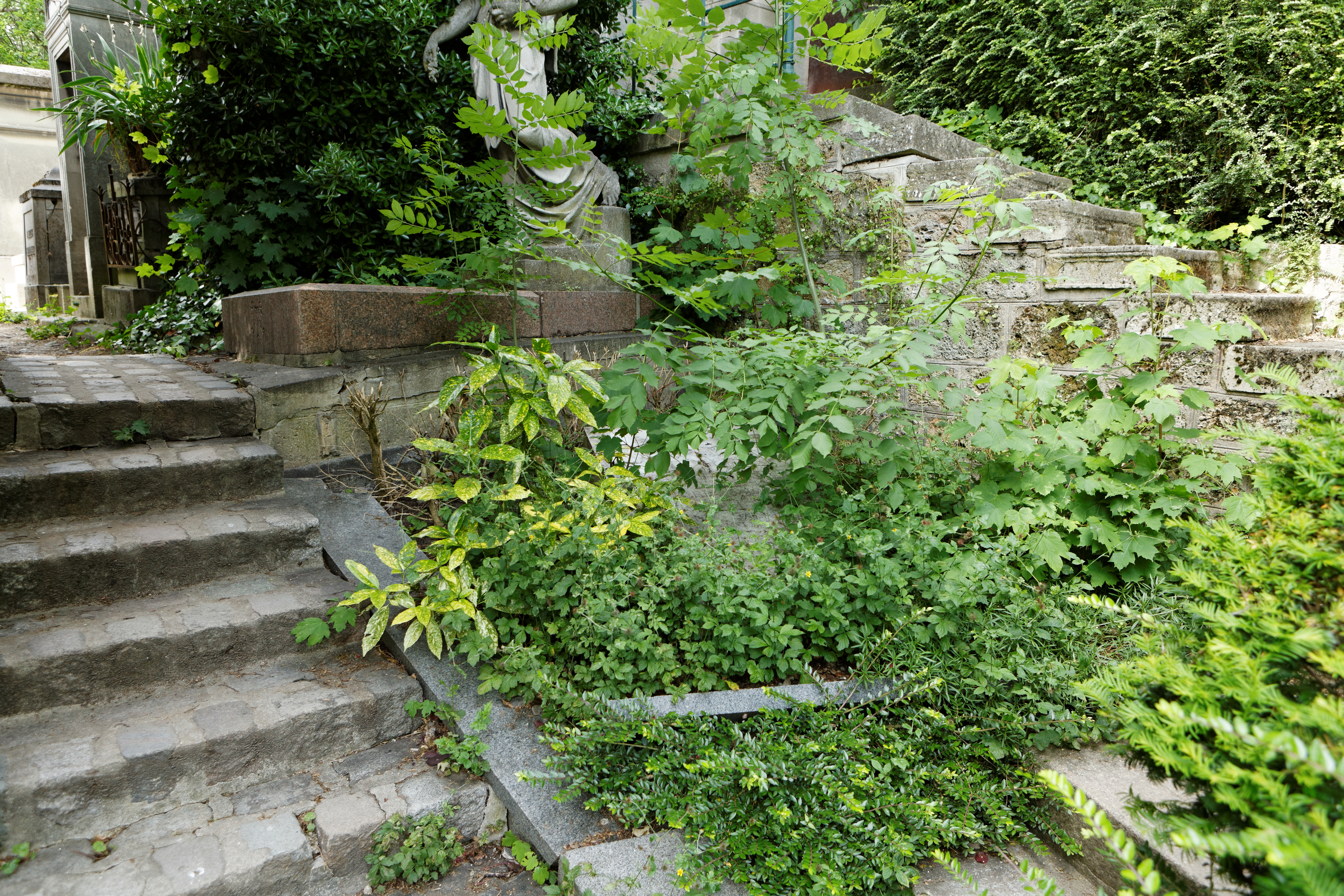 Sépulture de Francis Salabert (1884-1946), éditeur de musique.